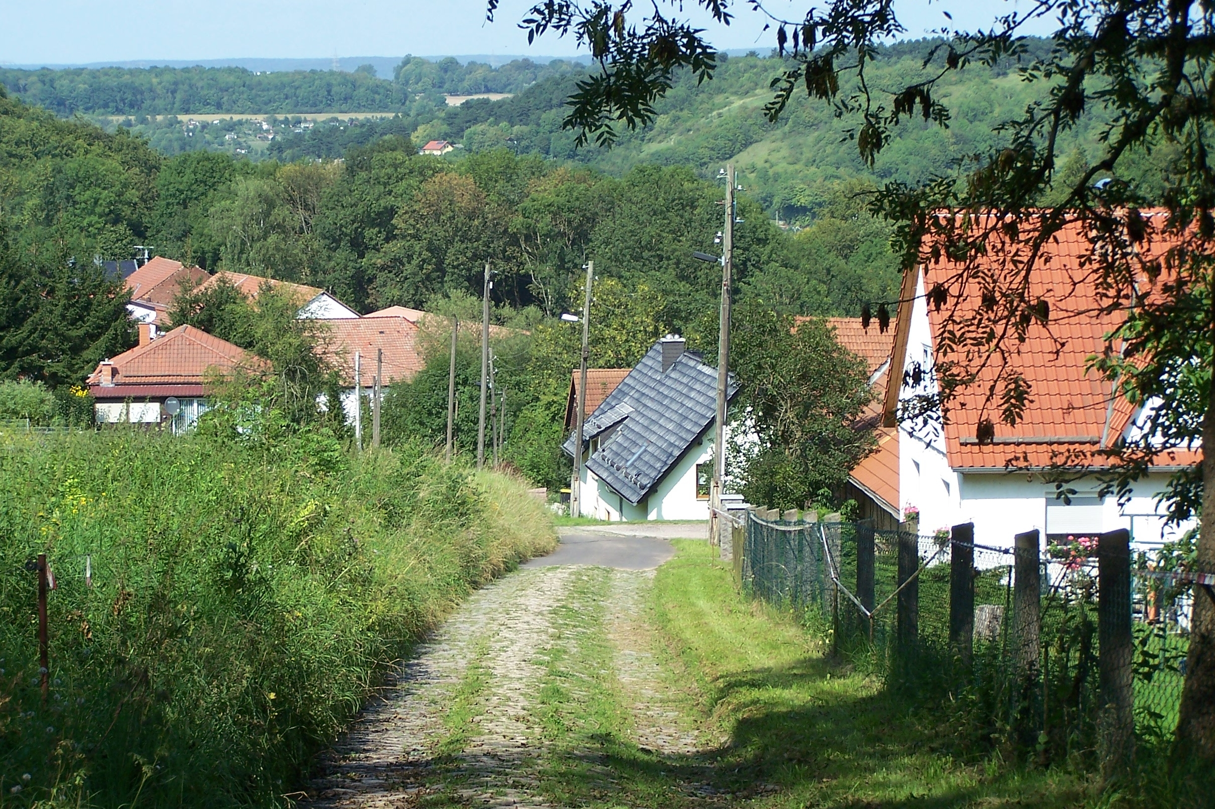 Ansicht der Siedlung Gefilde von Süden. Die Mehrzahl der 11 Häuser des Gefildes wurde in den Jahren 1948 bis 1951 als Neubauernsiedlung angelegt.